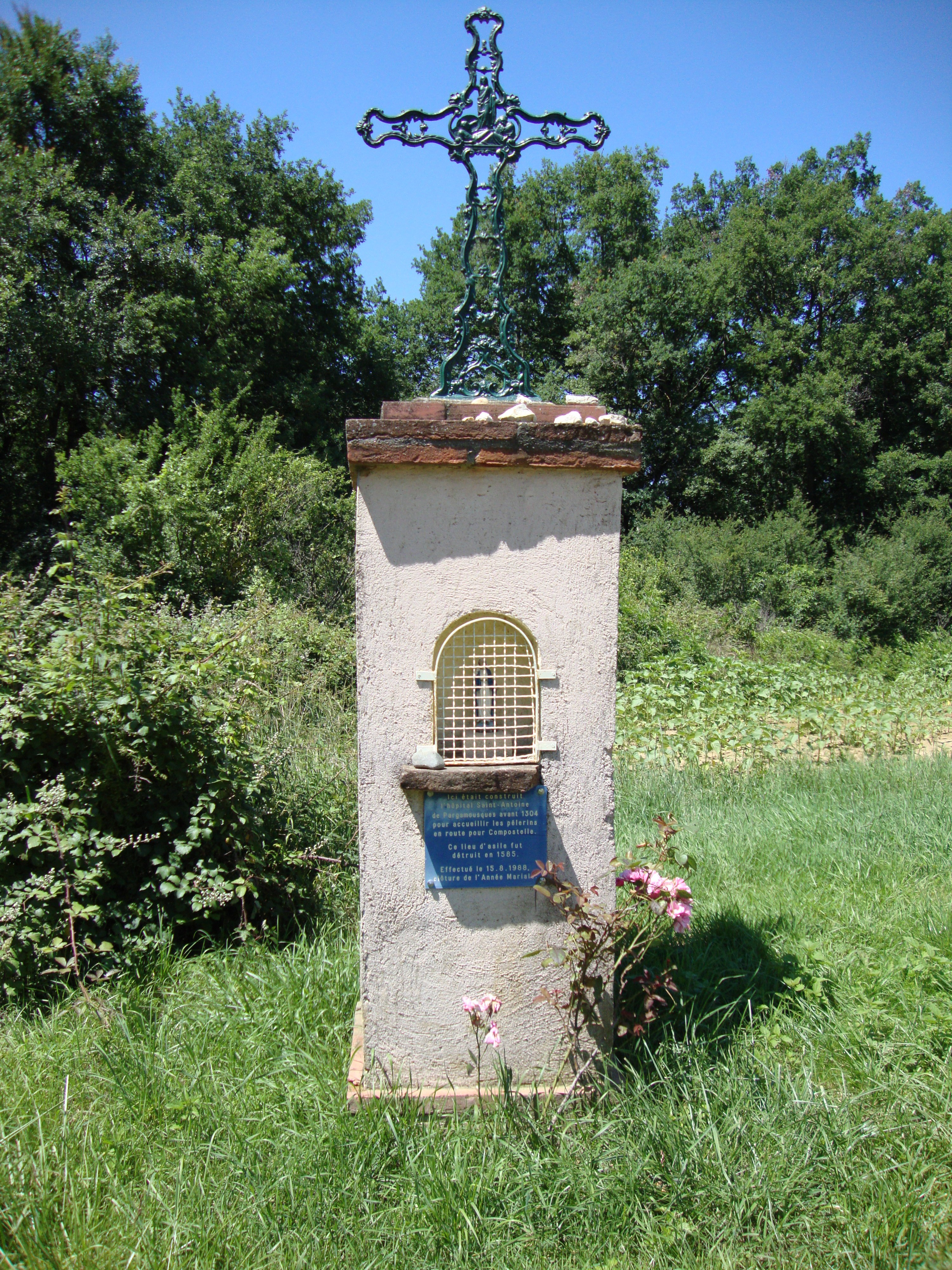 Pujaudran (Gers, France) - Oratoire commémorant l'hôpital Saint-Antoine.